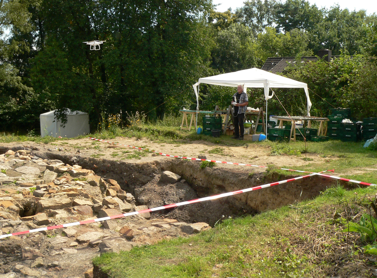 Ausgrabung Glashütte Klein Süntel, Drohnenflug der Archäologische Denkmalpflege des Niedersächsischen Landesamtes für Denkmalpflege